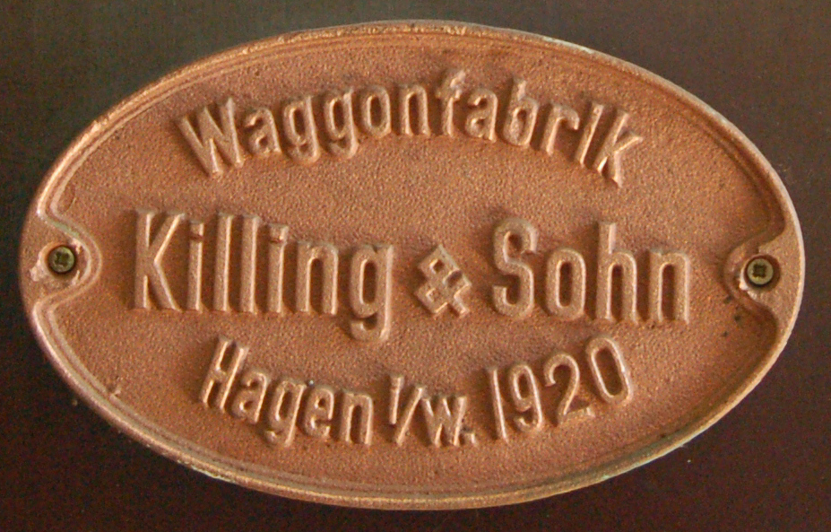 Typenschild der Waggonfabrik Killing & Sohn aus dem Jahr 1920.